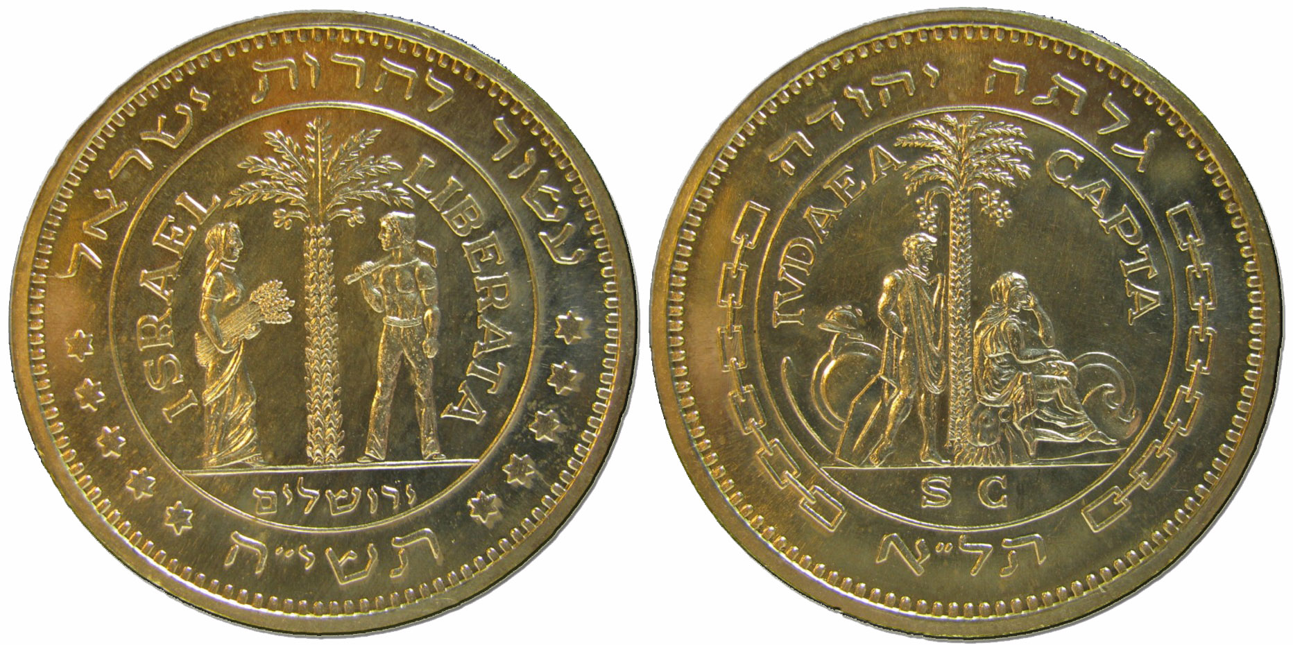 מדליית חירות ישראל, זהב